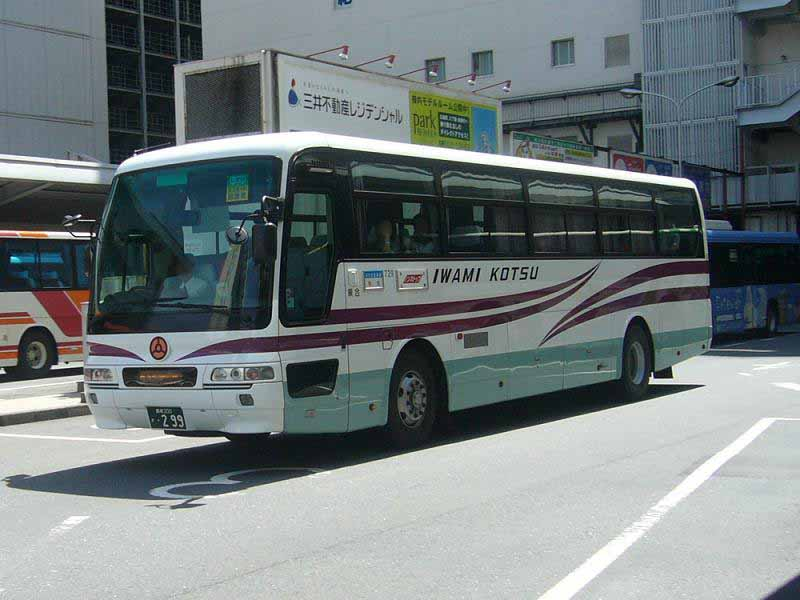 登録番号 島根200か・299 石見交通バス所属 いさりび号用 2007年6月16日 広島バスセンターにて撮影 撮影者 Tokatsu kokubu